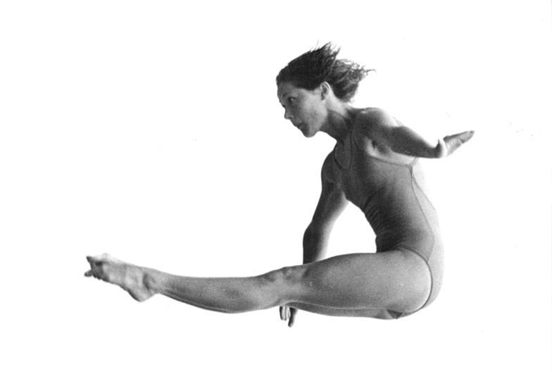 Ramona Wenzel ADN-ZB Kluge 12.6.82 Leipzig: Die 19jährige Rostockerin Ramona Wenzel, Siegerin im Turmspringen bei den DDr-Meisterschaften im Wasserpringen. (Hochfromat)